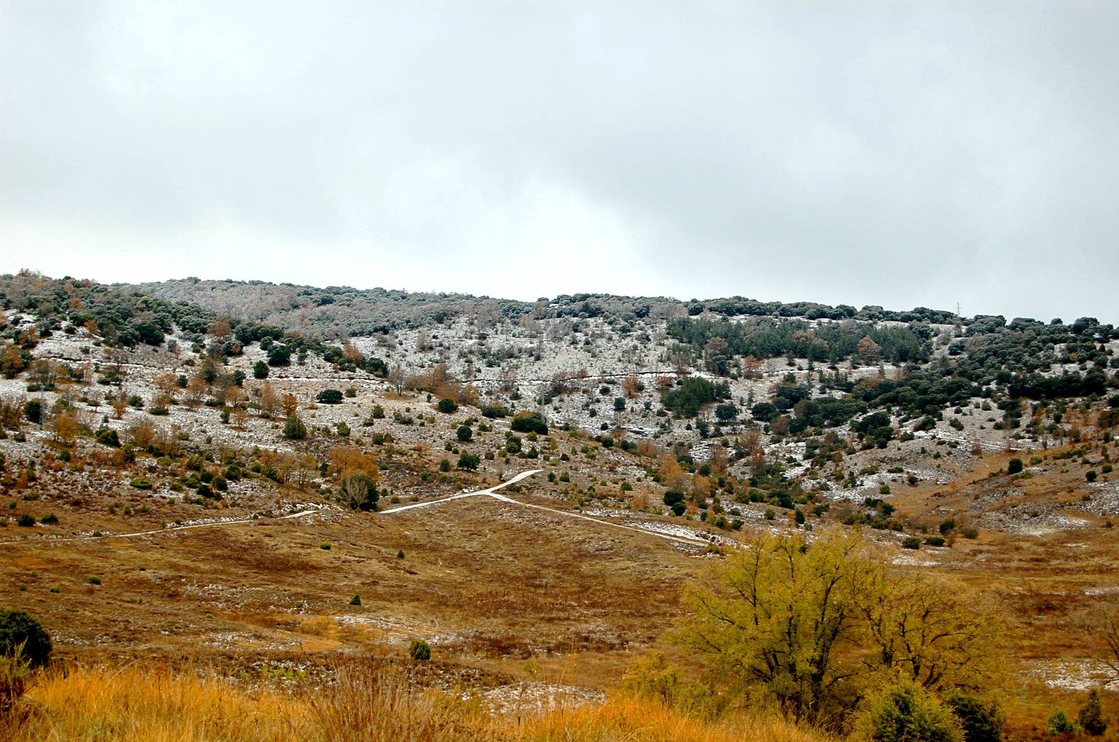 Pisos vegetales en Torrecuadrada de los Valles: en el valle, quejigar (Quercus faginea); arriba, encinar (Q. rotundifolia).